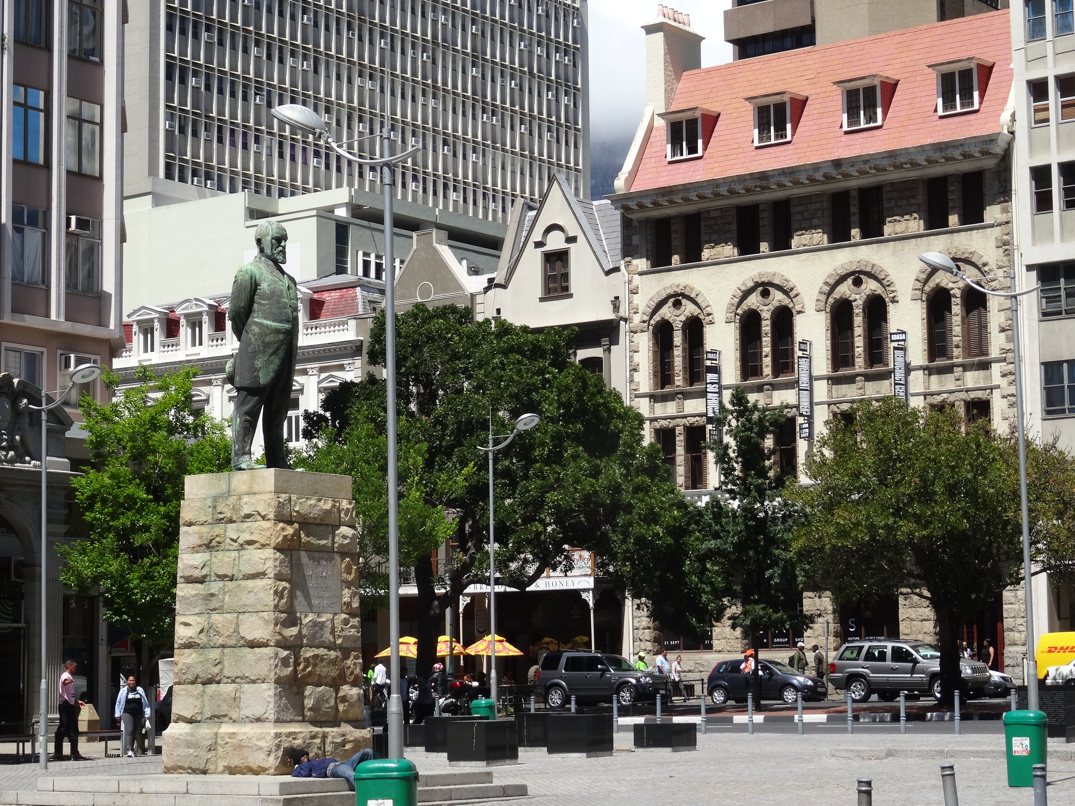 Statues of Jan Hofmeyr - church square - Cape Town